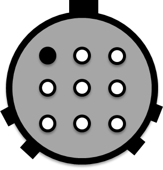 InCab Steckdose mit offenem ISOBUS. Diese benötigt einen Loop Stecker.